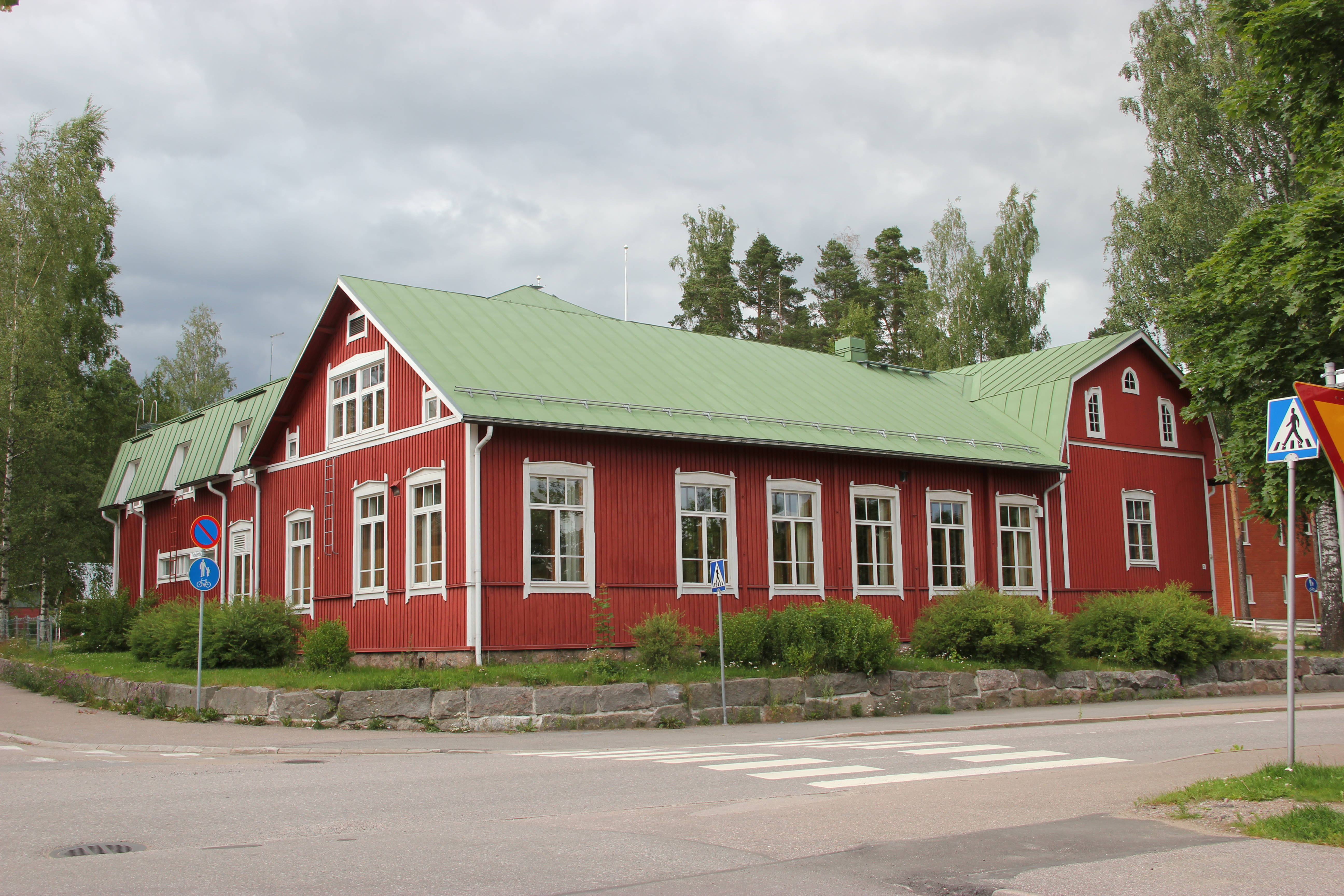 Nummelan Työväenyhdistys Elon toimitalo Rientola